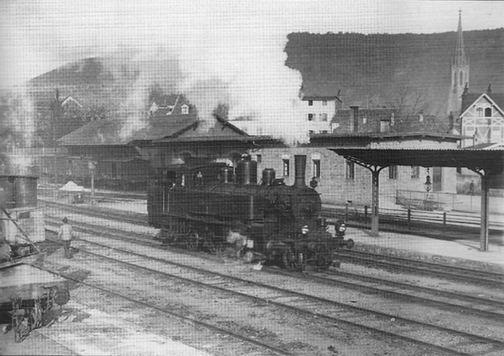 Dampflok der Baureihe P2.II im Bf. Bad dürkheim umn 1905